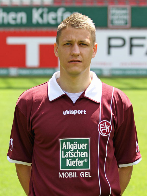 Ivo Ilicevic, Fußballspieler